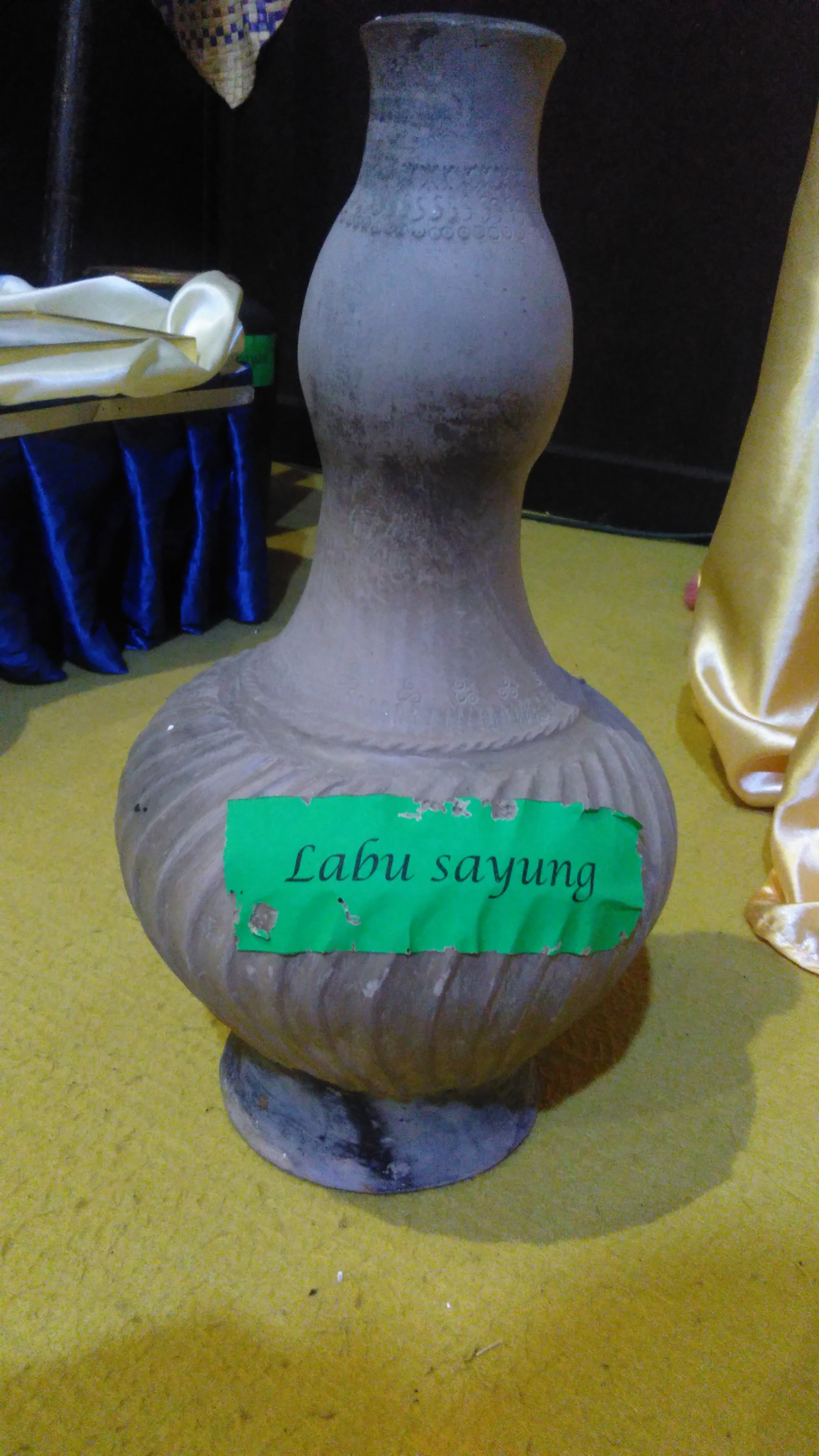 Labu Sayong